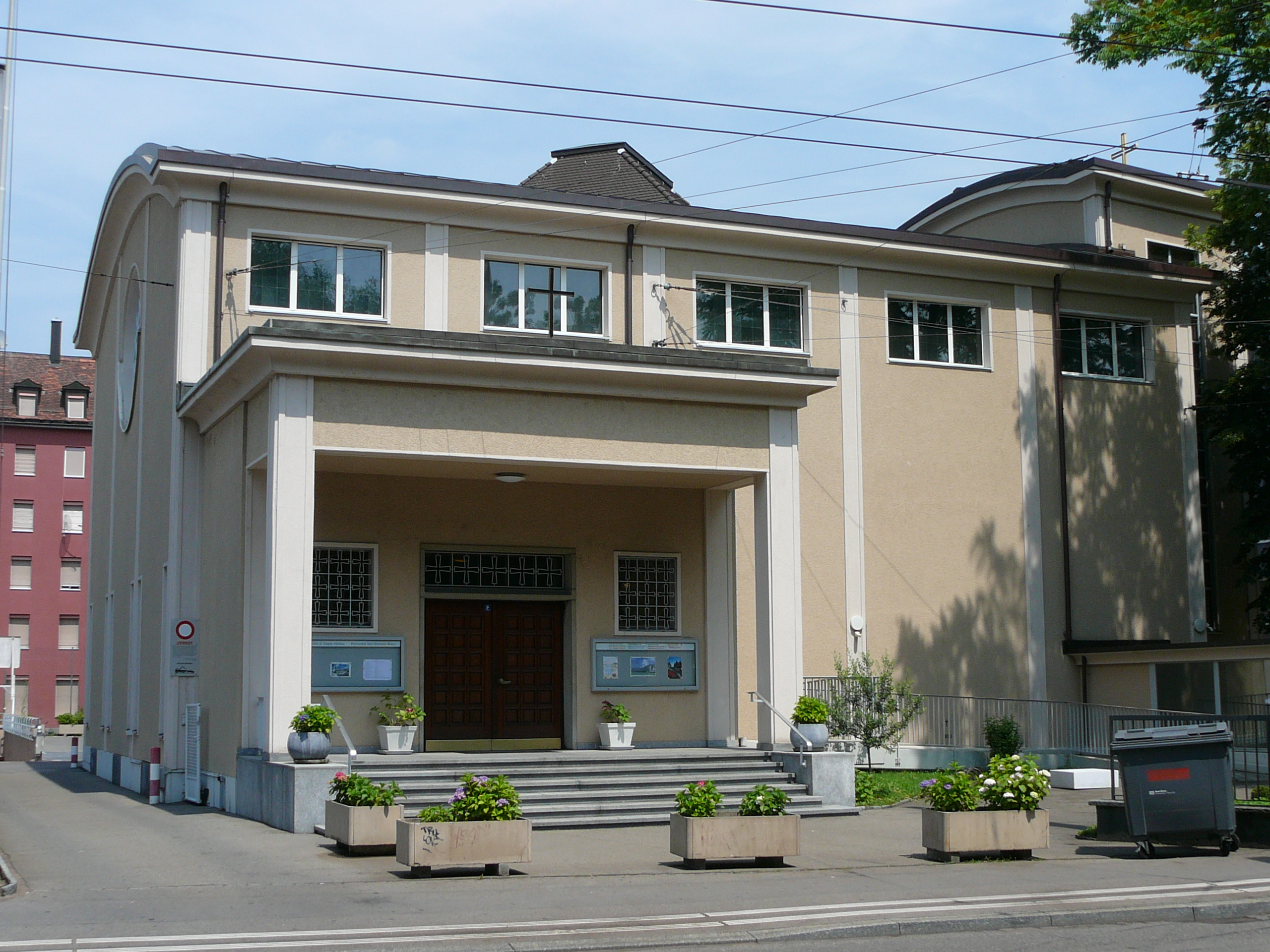 Römisch-katholische Kirche Don Bosco Zürich-Aussersihl, Ansicht von Hohlstrasse